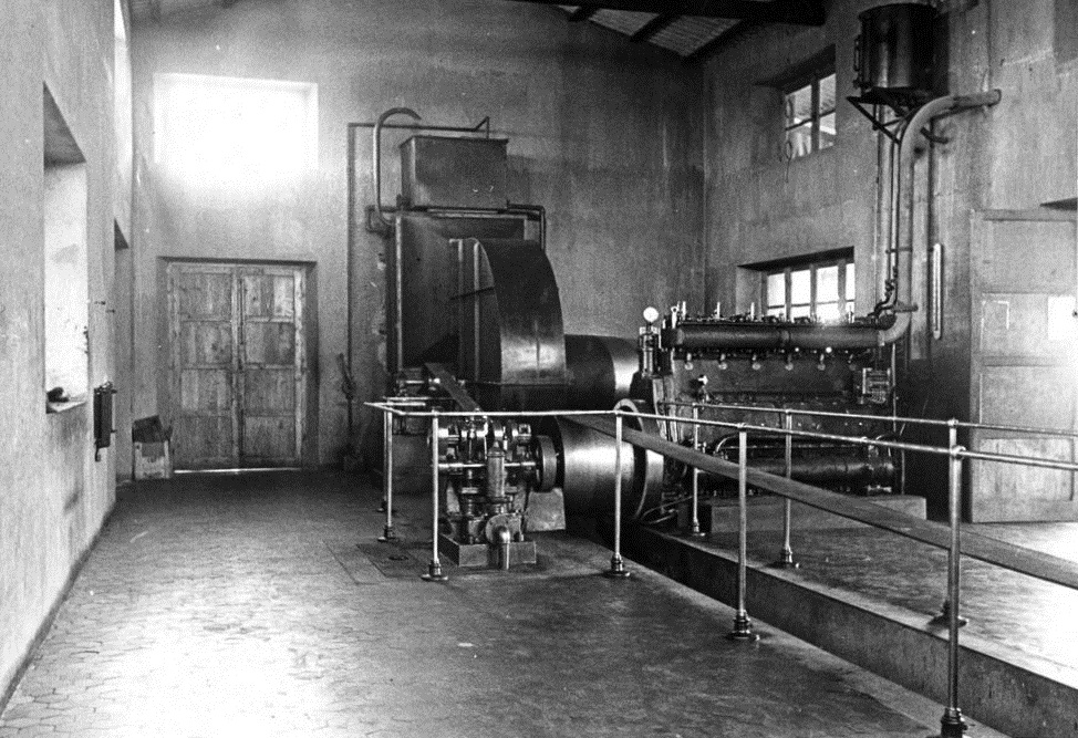 Interno sala macchine Dig Digta